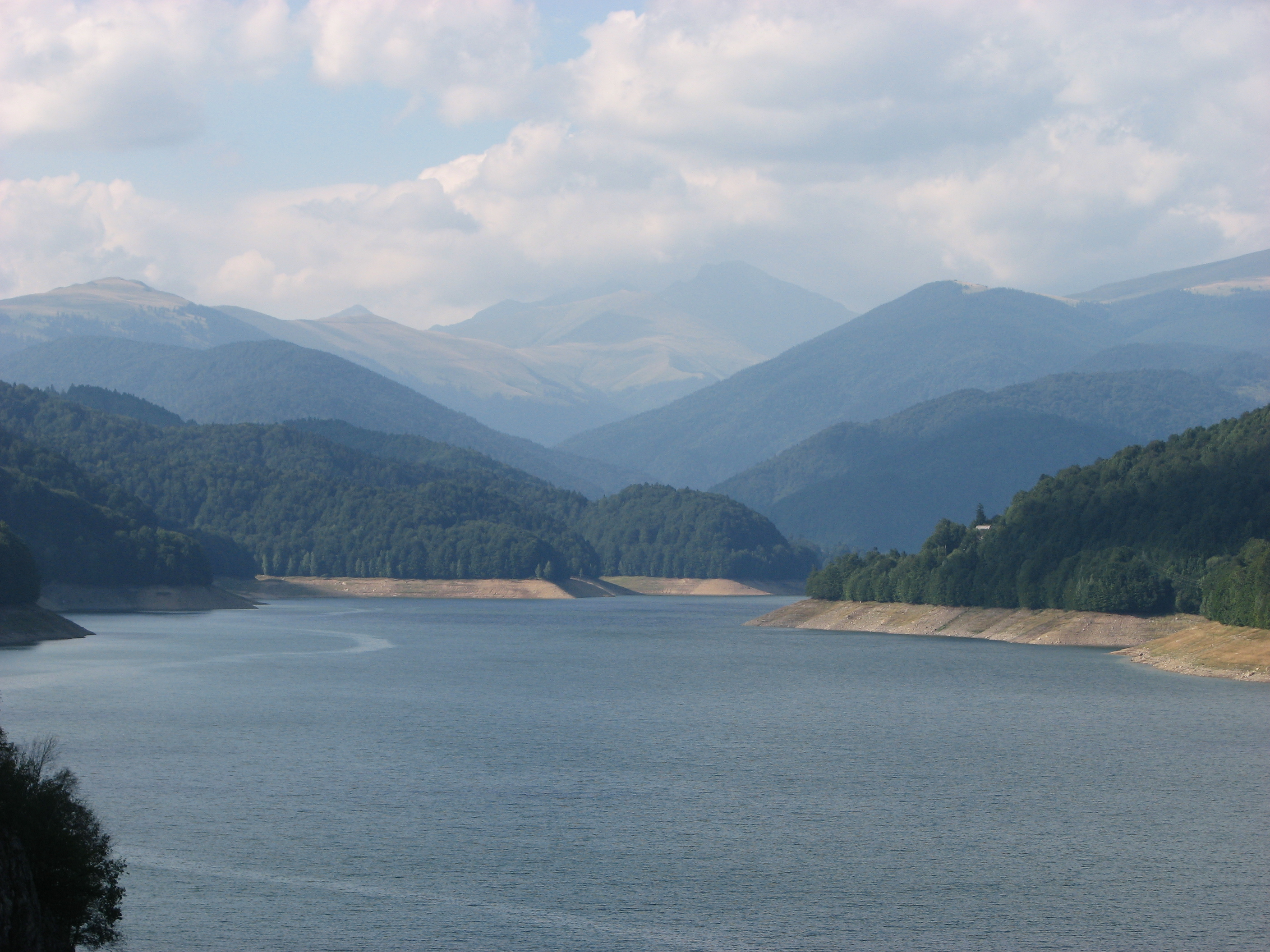 Vidraru Lake, Argeş County, Romania